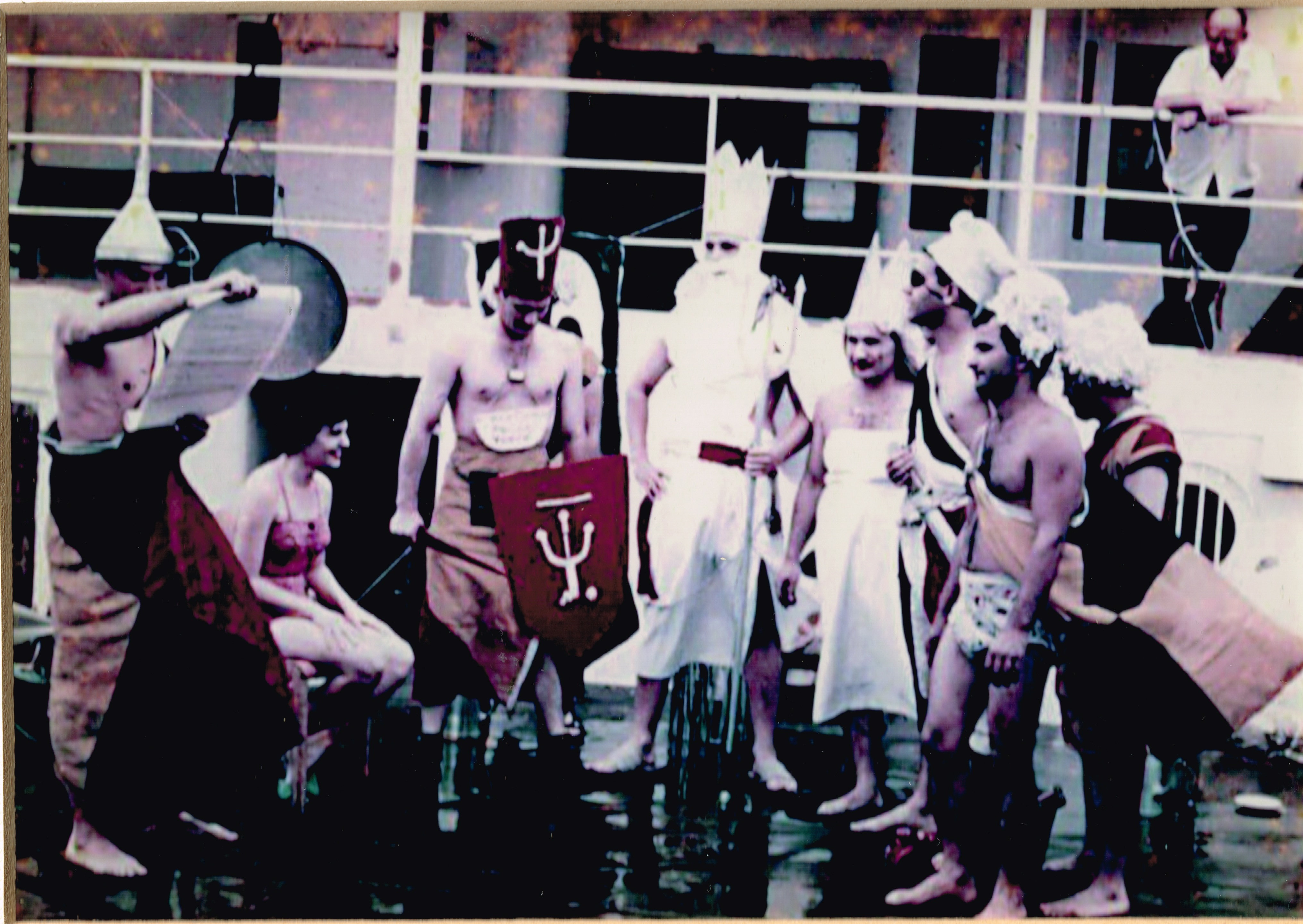 טקס חציית המשווה באניית צים יהודה 1955